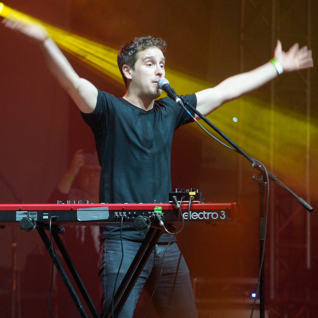 Krzysztof Zalewski z zespołem podczas Rocket Festiwal 2014 w Warszawie.